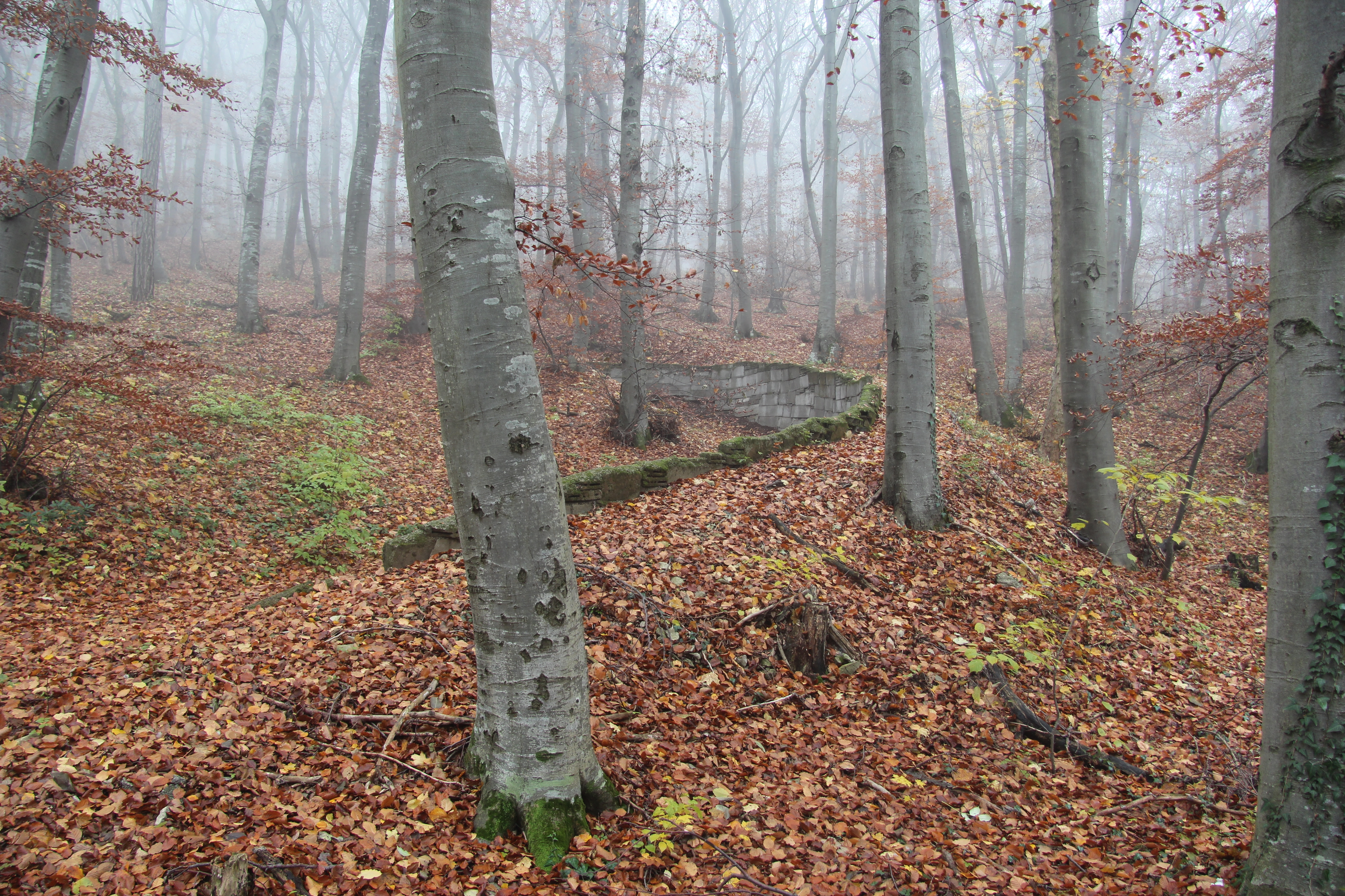 Reste der 1928 errichteten, aber nicht mehr bestehenden Kunstrodelbahn am Anninger, im Naturpark Föhrenberge